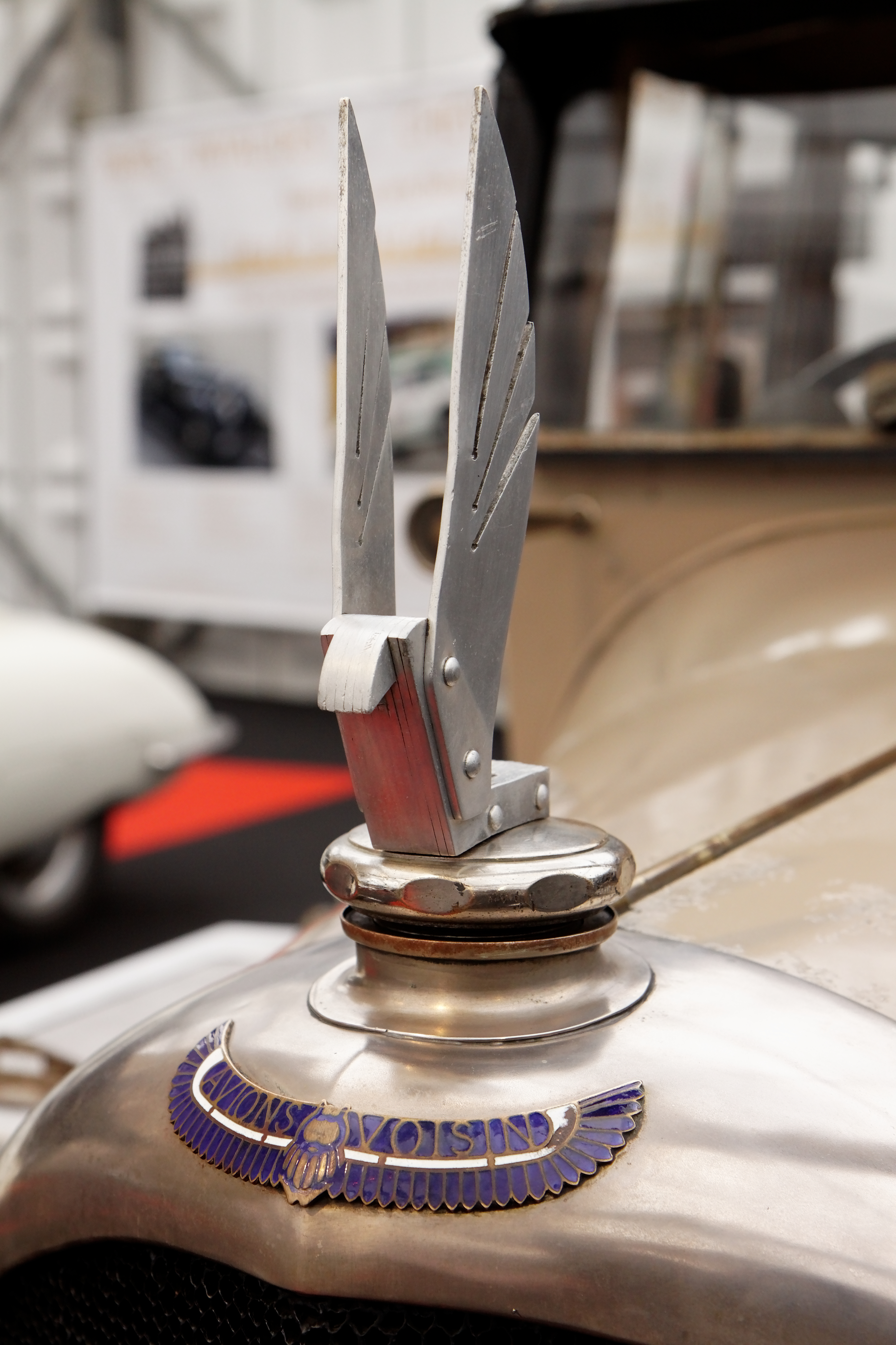 L'Avions Voisin C7 classique5 exposée devant le dôme des Invalides lors du festival automobile international 2011.